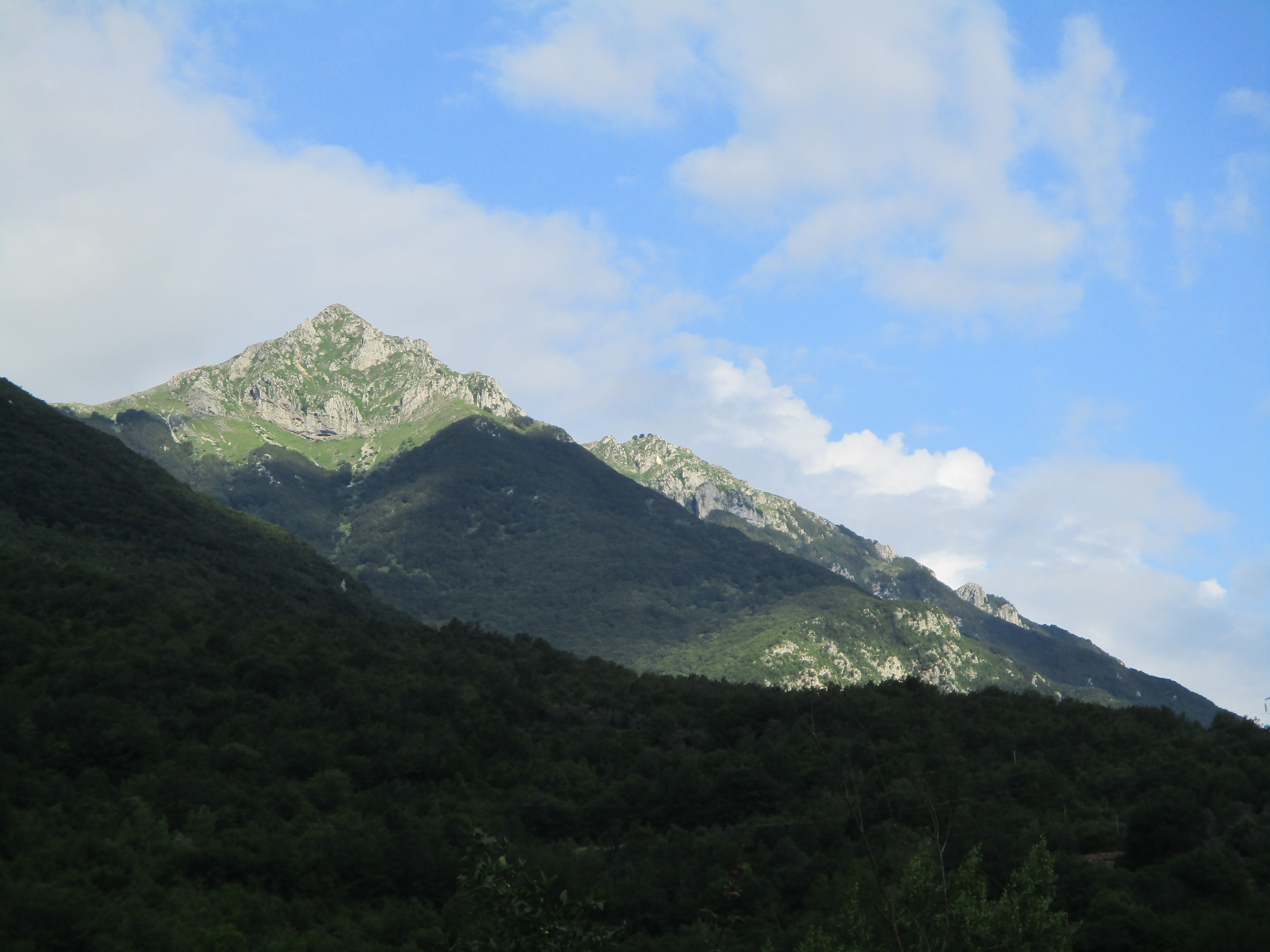 Il Pizzo Deta visto da Collepiano di Balsorano